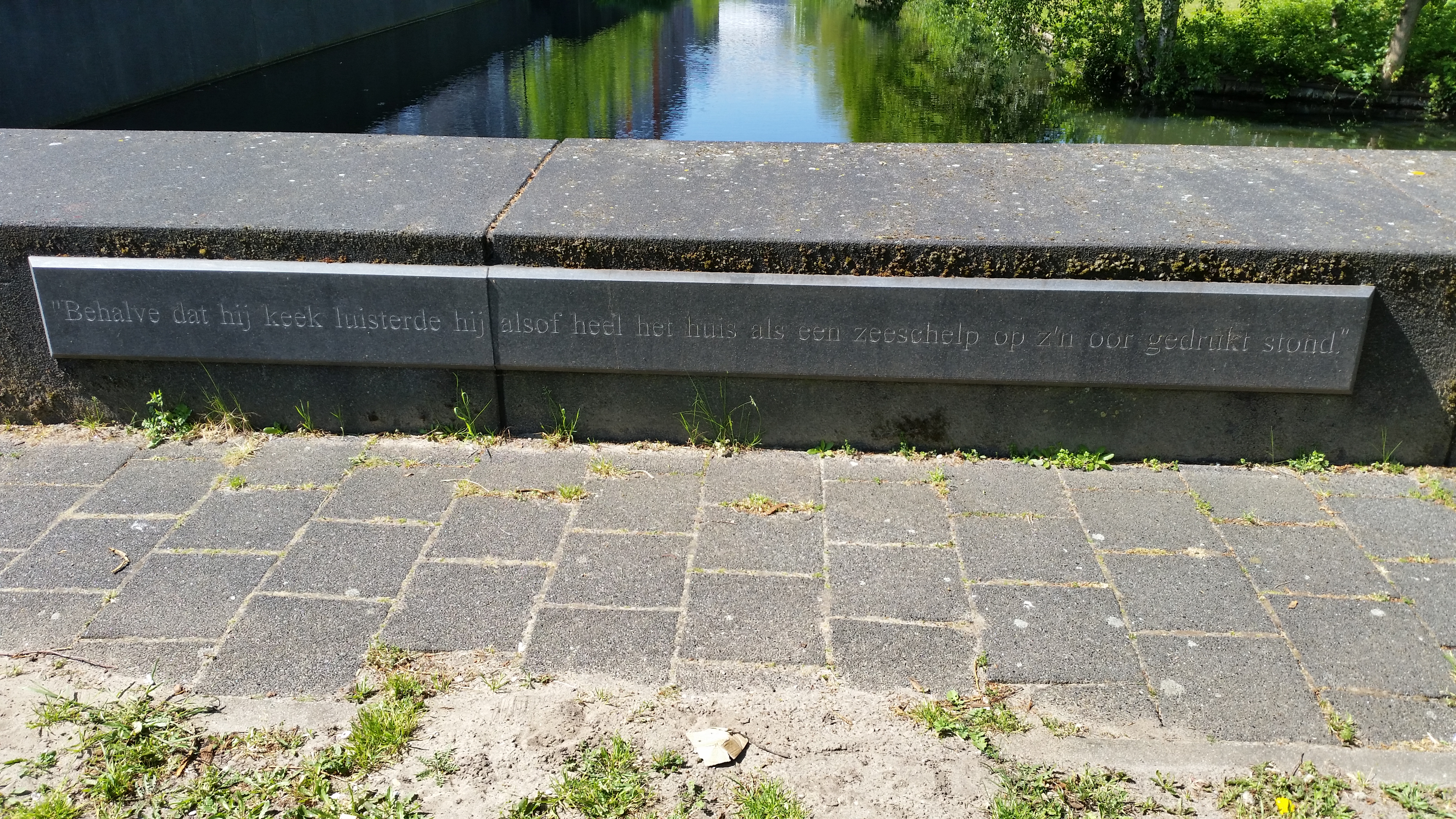 Impressie van Het geheim en het bewijs aan de Abcouderpad, Amsterdam-Zuidoost